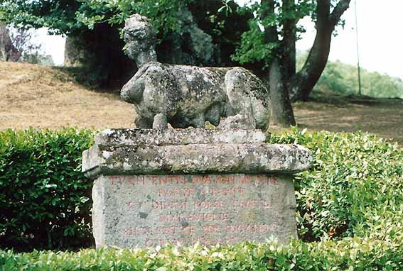 Jardins de Bomarzo - Sphinx